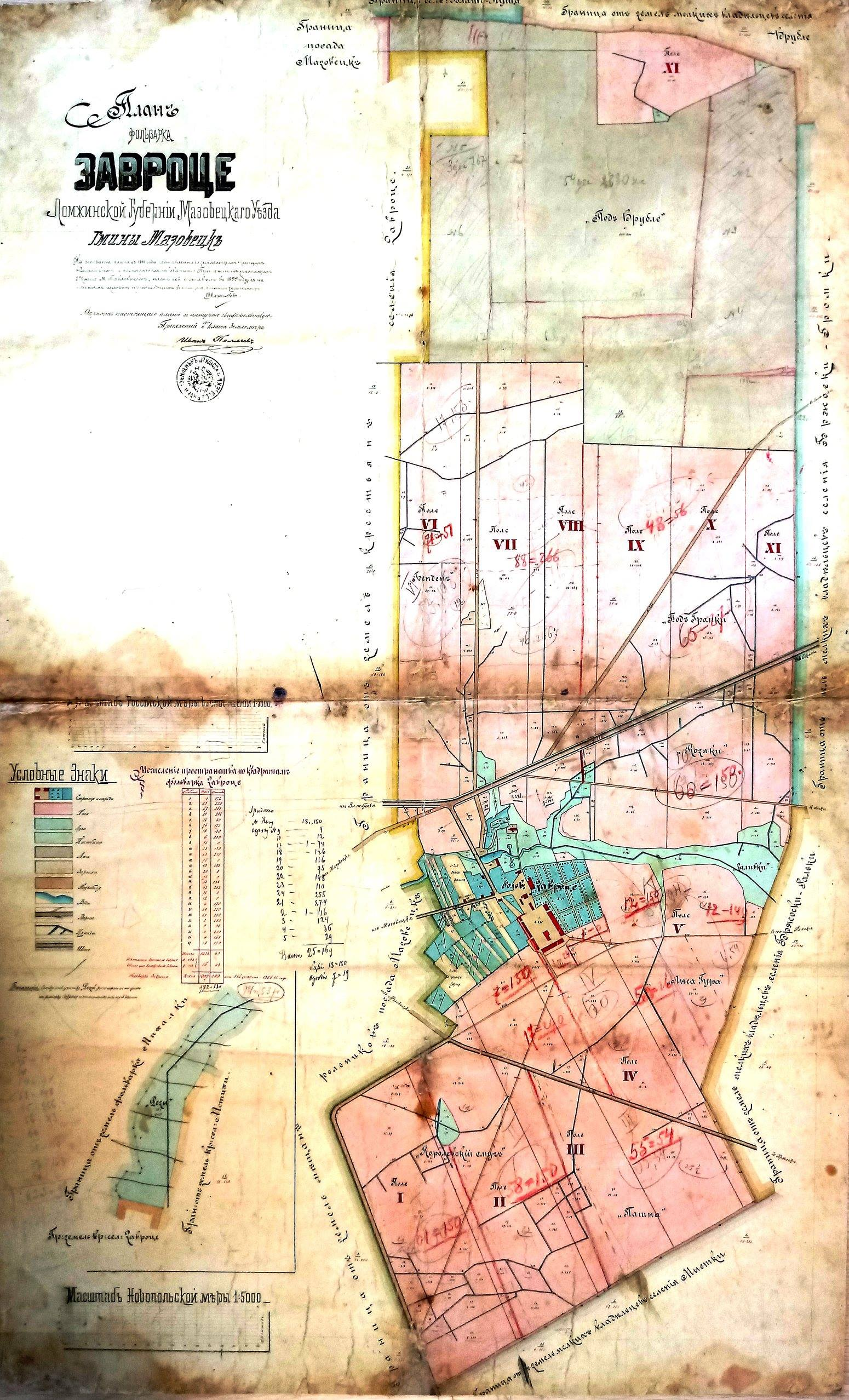 Plan folwarku Zawrocie należącego do rodziny Kiełczewskich. Obecnie Galeria Zielona ul. Białostocka.